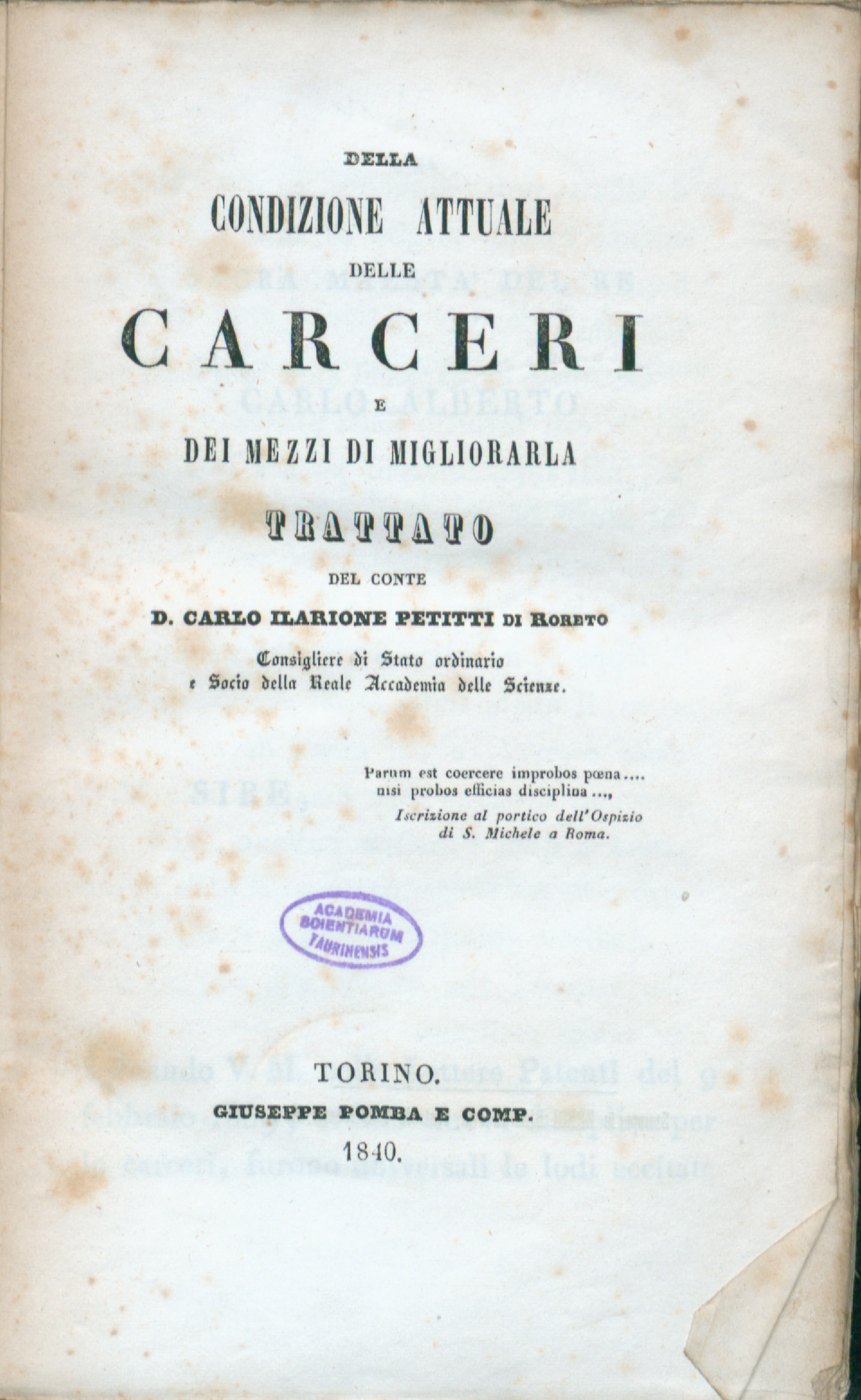 Frontespizio